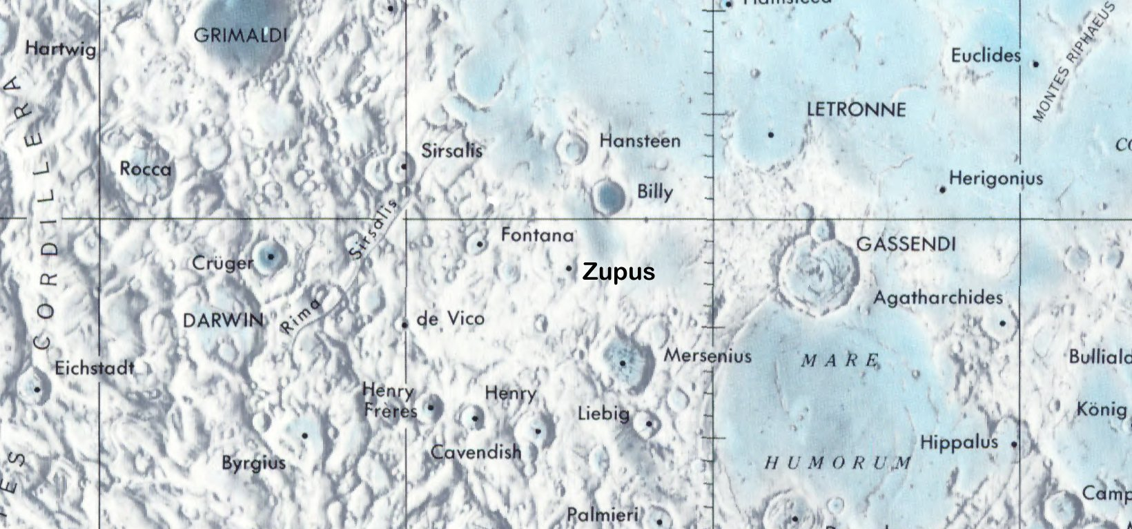 Cráter lunarZupus . Localización. (Lunar Chart LPC1. Second Edition)